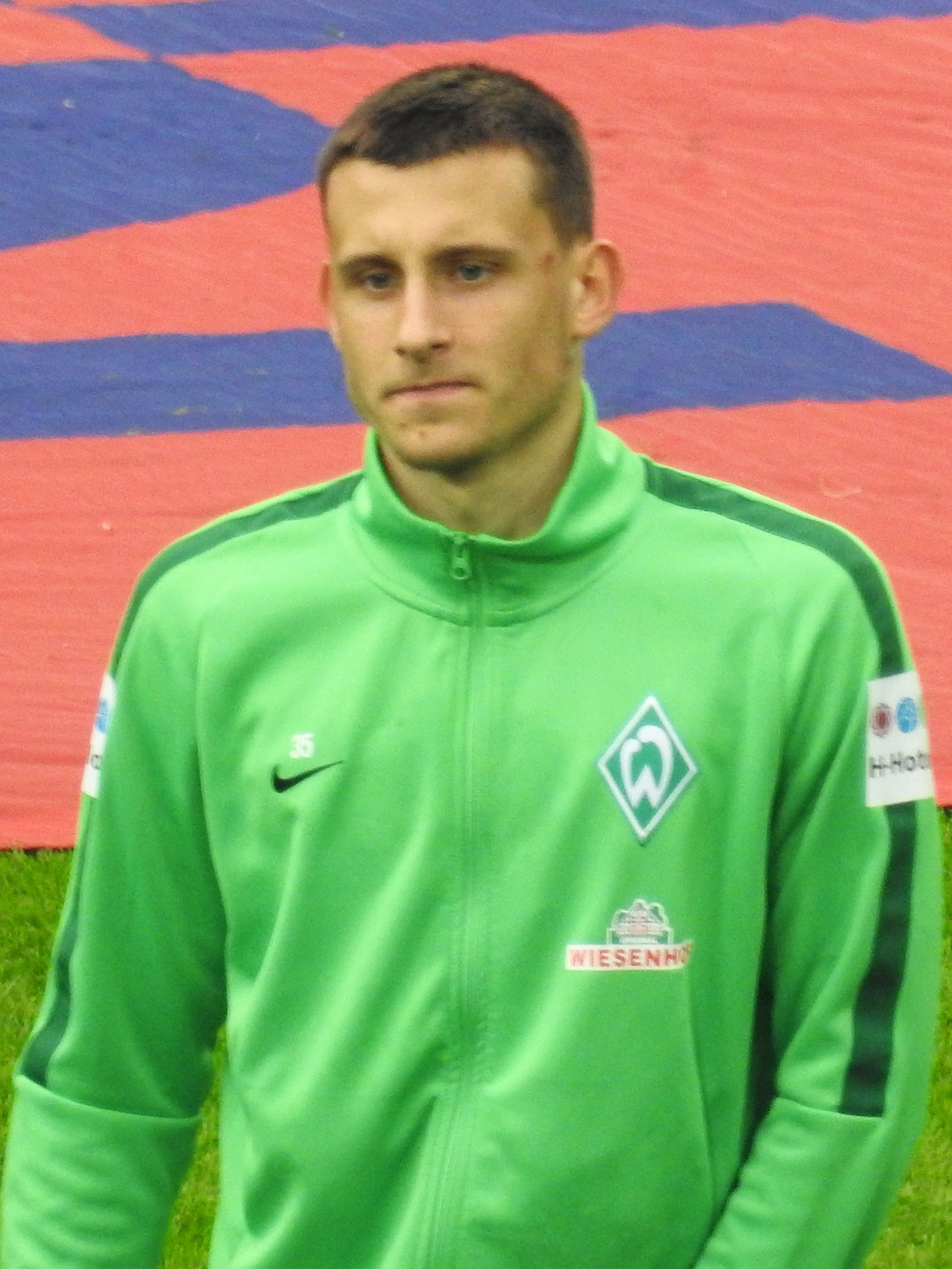 Maximillian Eggestein, Werder Bremen